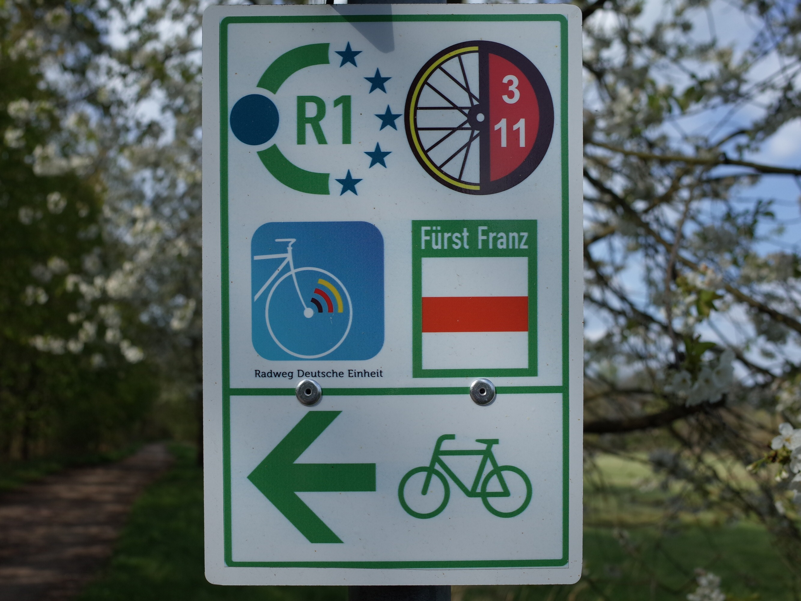 Oranienbaum, Wegweiser im Biosphärenreservat Mittelelbe für Europaradweg R1, Radfernwanderwege D3 und D11, Radweg Deutsche Einheit und der Gartenreich-Tour "Fürst Franz"